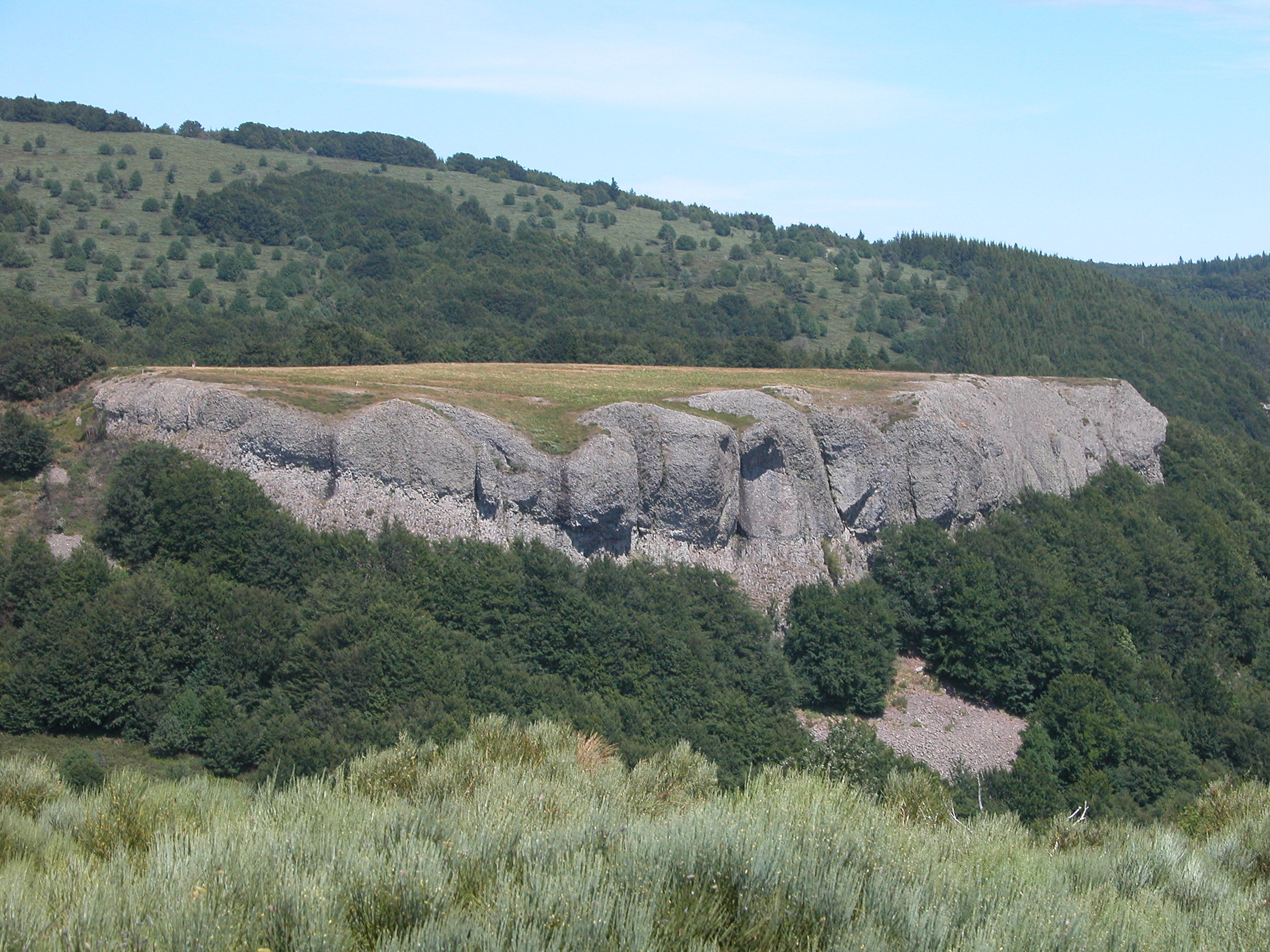 Paysages à Labastide sur Besorgues